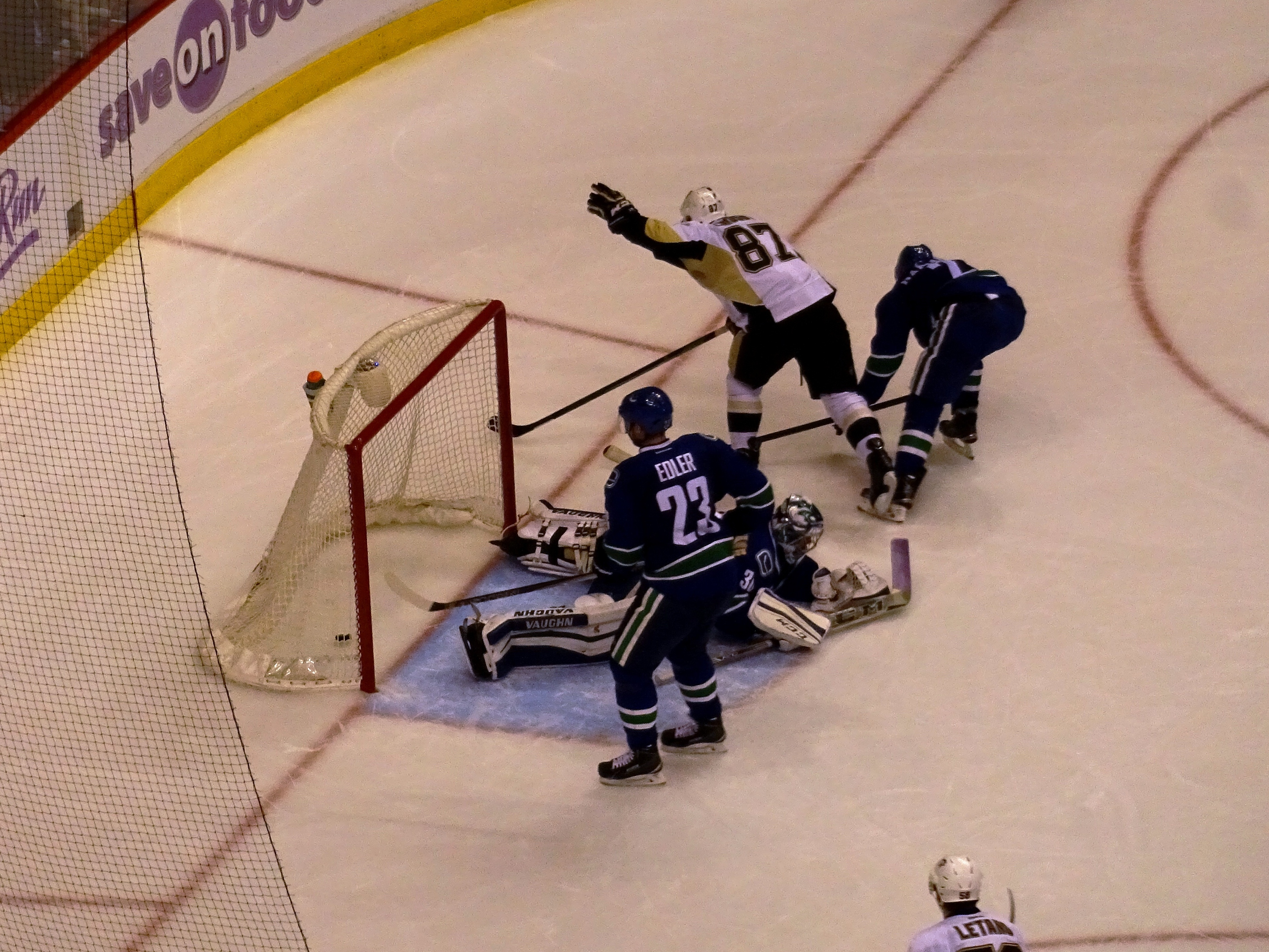 Pit @ Van, 4-Nov-2015